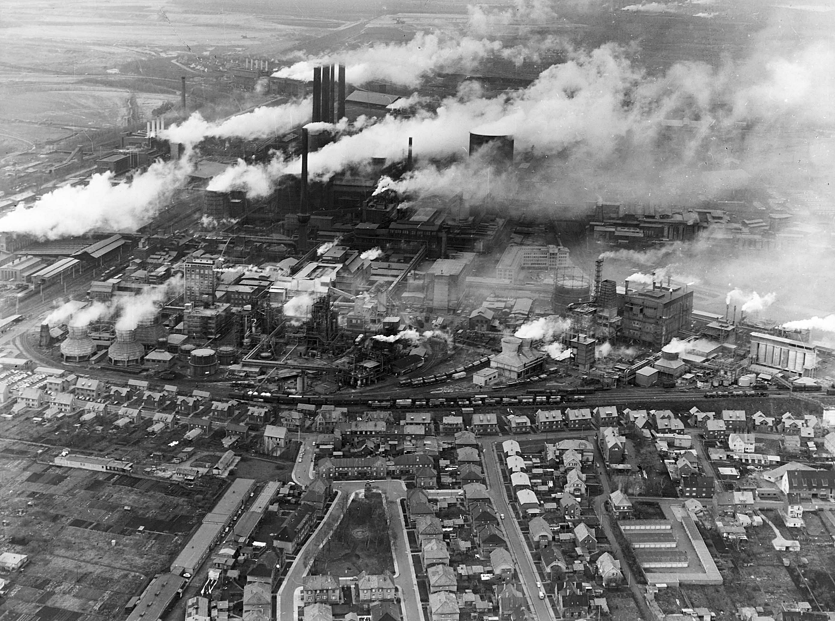 Luftaufnahme Chemiepark Knapsack, Werksteil Knapsack mit Goldenbergwerk, Hürth; vorne Alt-Knapsack